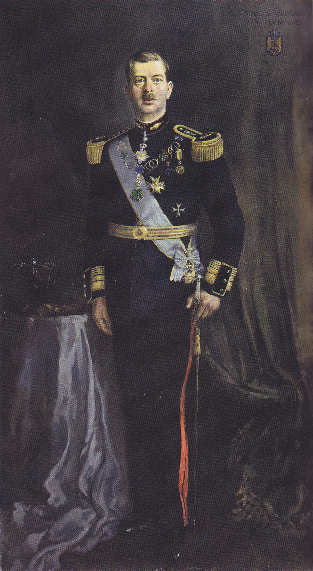 Ulei pe pânză, 1937, 1,40.2,50 m, Muzeul Național de Artă al României.